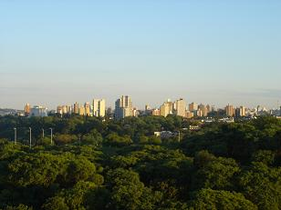 Carlos Smith, Ciudad de Paraná desde el Parque Nuevo, Diciembre 2005